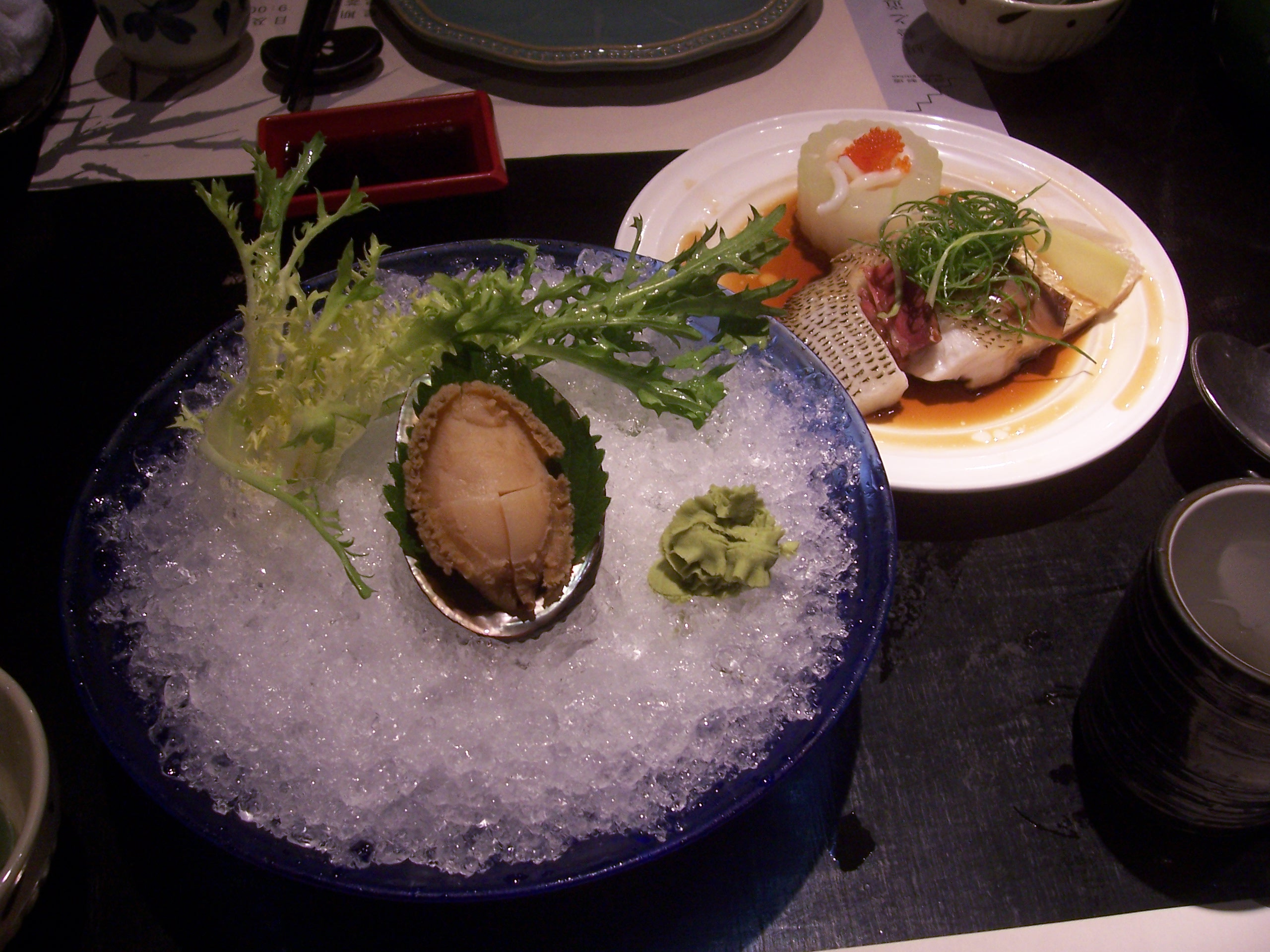 Abalone servie dans le restaurant cantonais "Made in kitchen" ouvert en 2003 par l'Original Conception Catering Group.